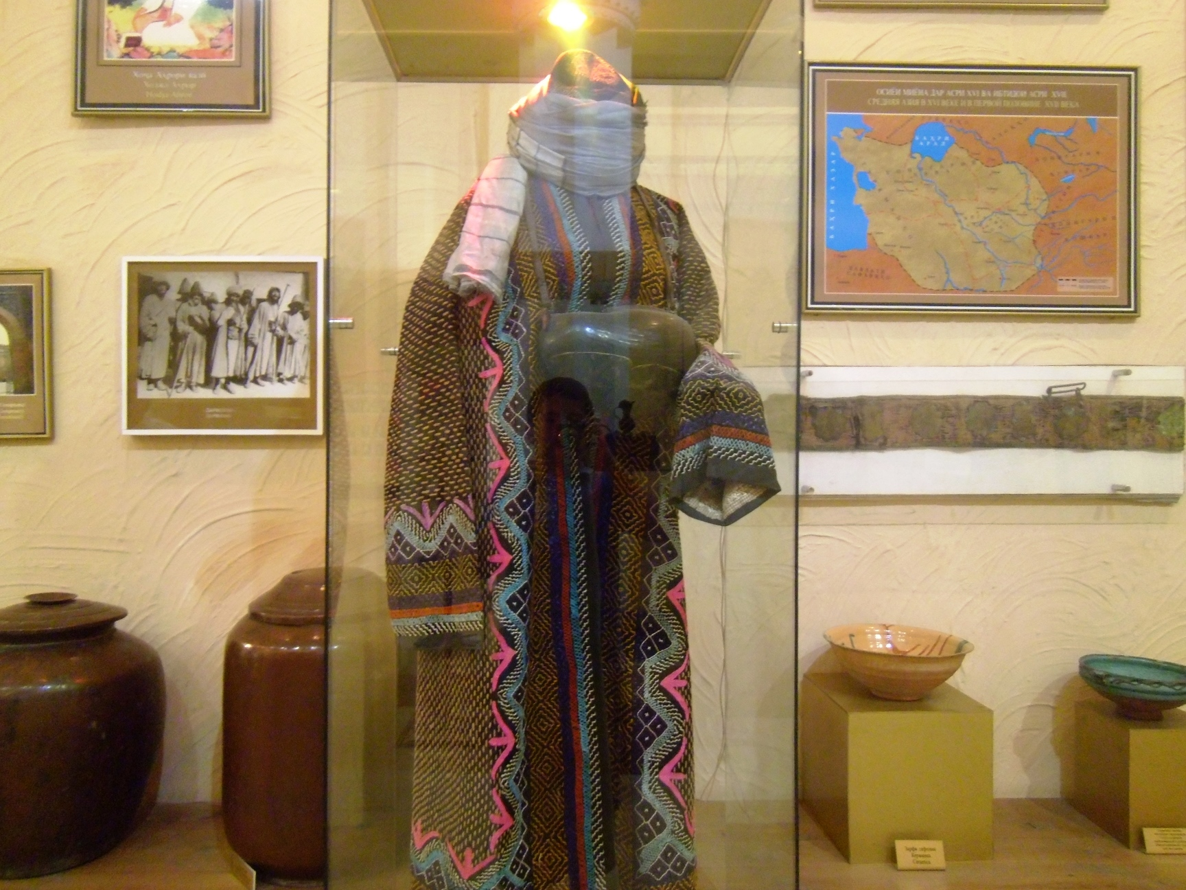 Музейные экспонаты в Согдийской области Тоҷикӣ: Экспонатҳои осорхонаҳои вилояти Суғд